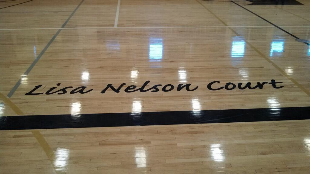 Lisa Nelson Court